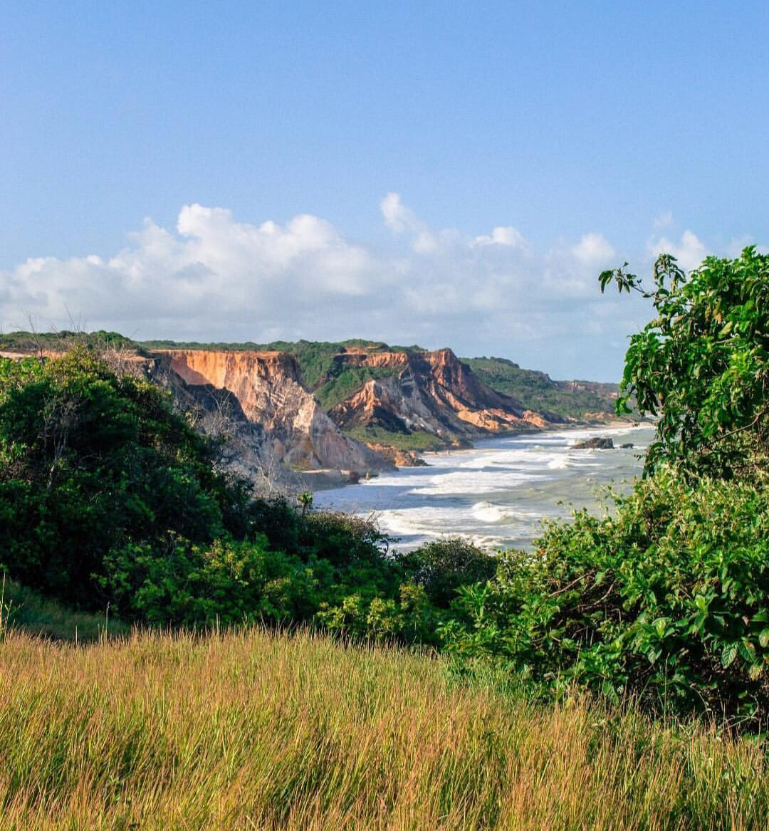 Praia de arapuca conde paraiba